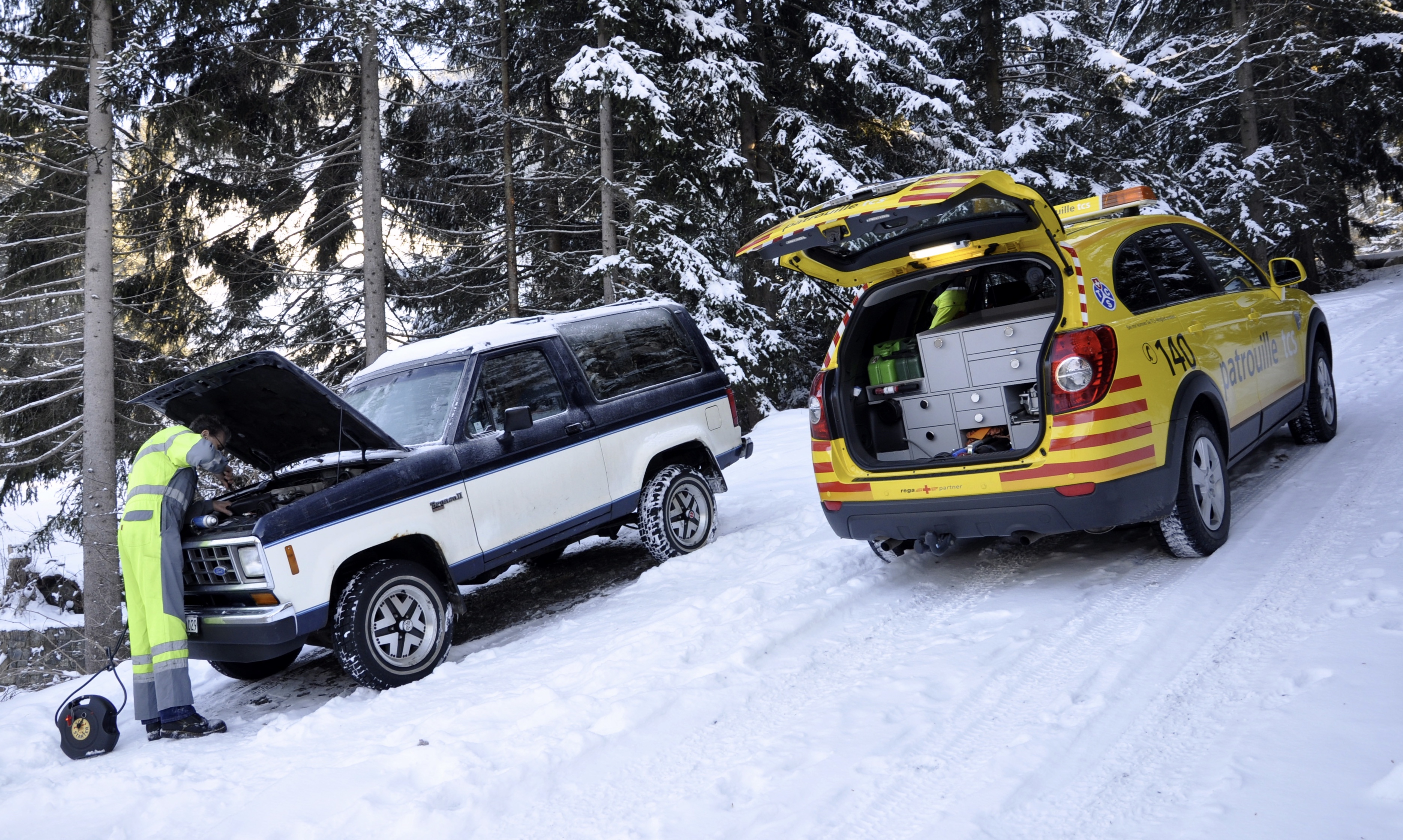 TCS en intervention sur la neige